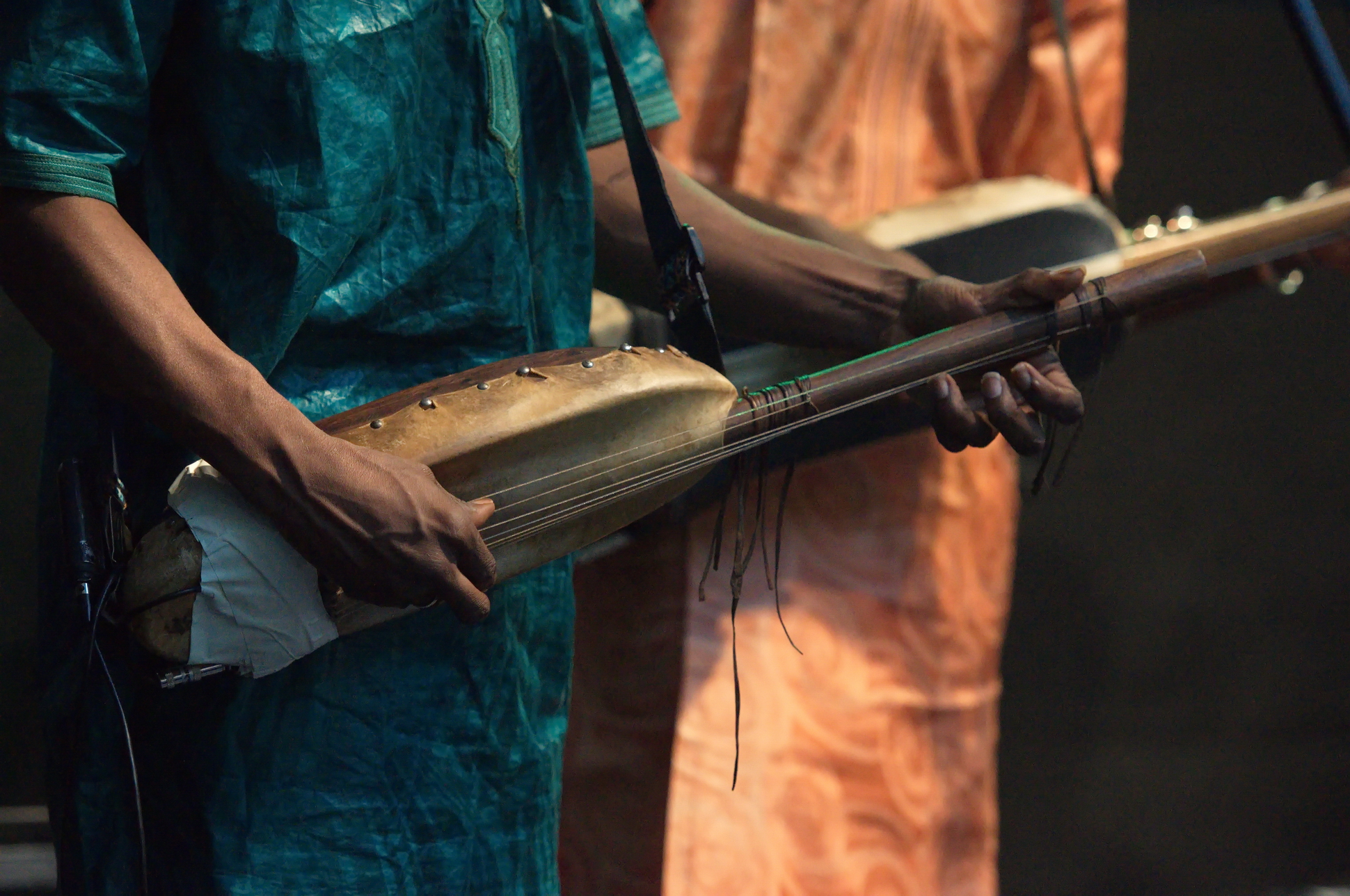 Open-Air-Konzert von Bassekou Kouyate & Ngoni ba; Tournee "Jama ko" im Skulpturenpark Waldfrieden, Wuppertal Bassekou Kouyaté: Ngoni Aminata Sacko: Gesang Mamadou Kouyate: Ngoni Bass Moustafa Kouyate: Ngoniba Mahamadou Tounkara: Yabara, Tama Abou Sissoko: Ngoni Moctar Kouyate: Calebasse